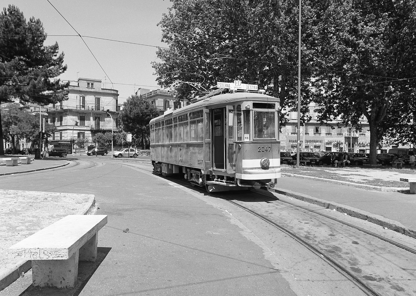 Motrice MRS ultimo esemplare ATAC, matricola n. 2047, tabellata ED (Esterna circolare Destra): la linea da anni non più esistente, lo scudetto SPQR e la scritta A.T.A.C. in rilievo lateralmente, il frontale col fanale oscurato e la fascia bianca riflettente fanno pensare che il tram sia stato impiegato in qualche sequenza cinematografica, ambientata in periodo bellico.